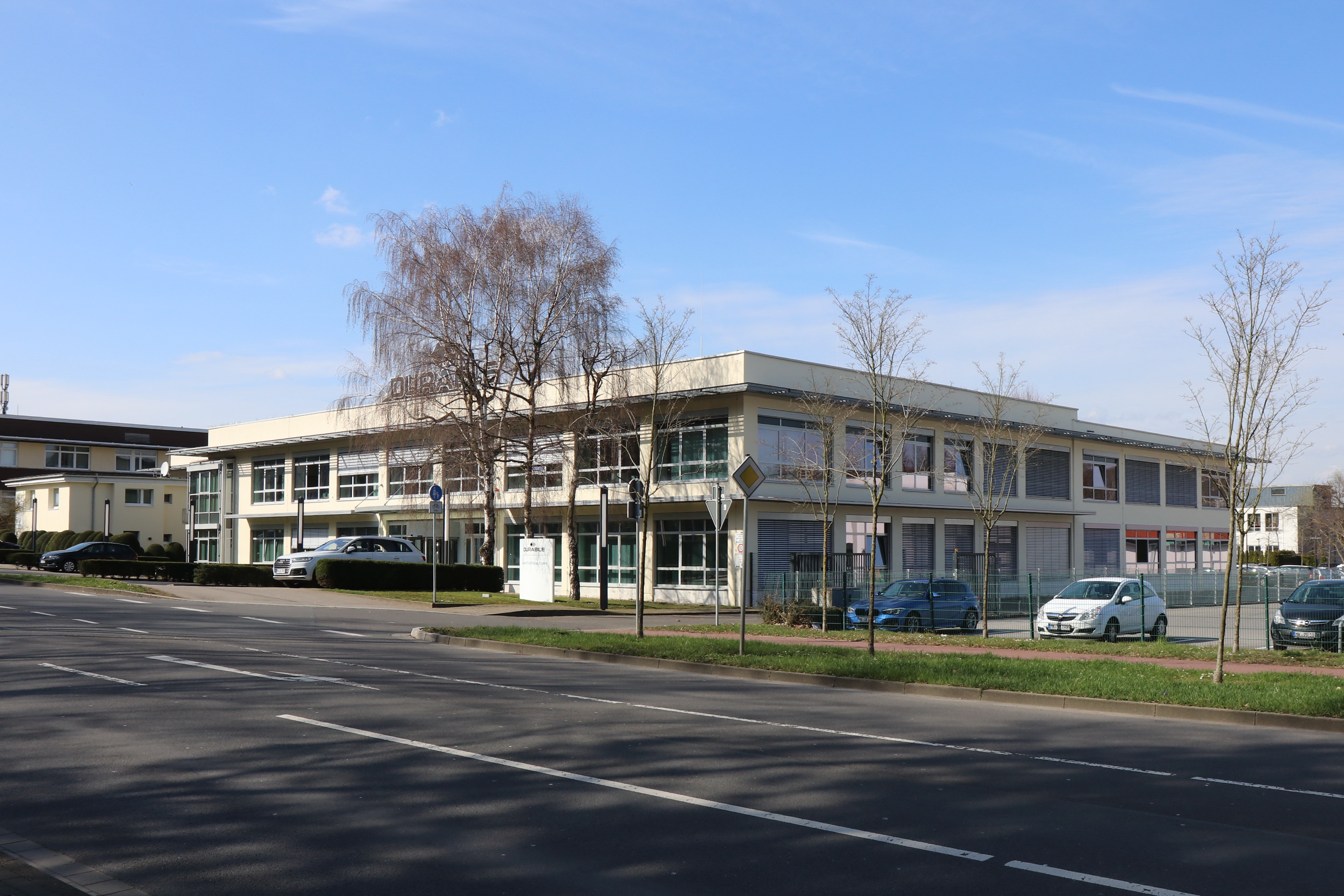 DURABLE Hunke & Jochheim in Iserlohn, Westfalenstraße 77-79.